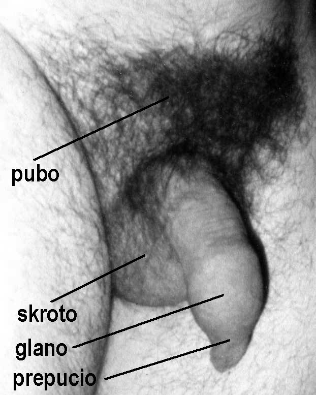 La partoj de homa peniso - analoge al , mem fotis, gnu-kopirajto 2006 de vikipediisto:kanadanino